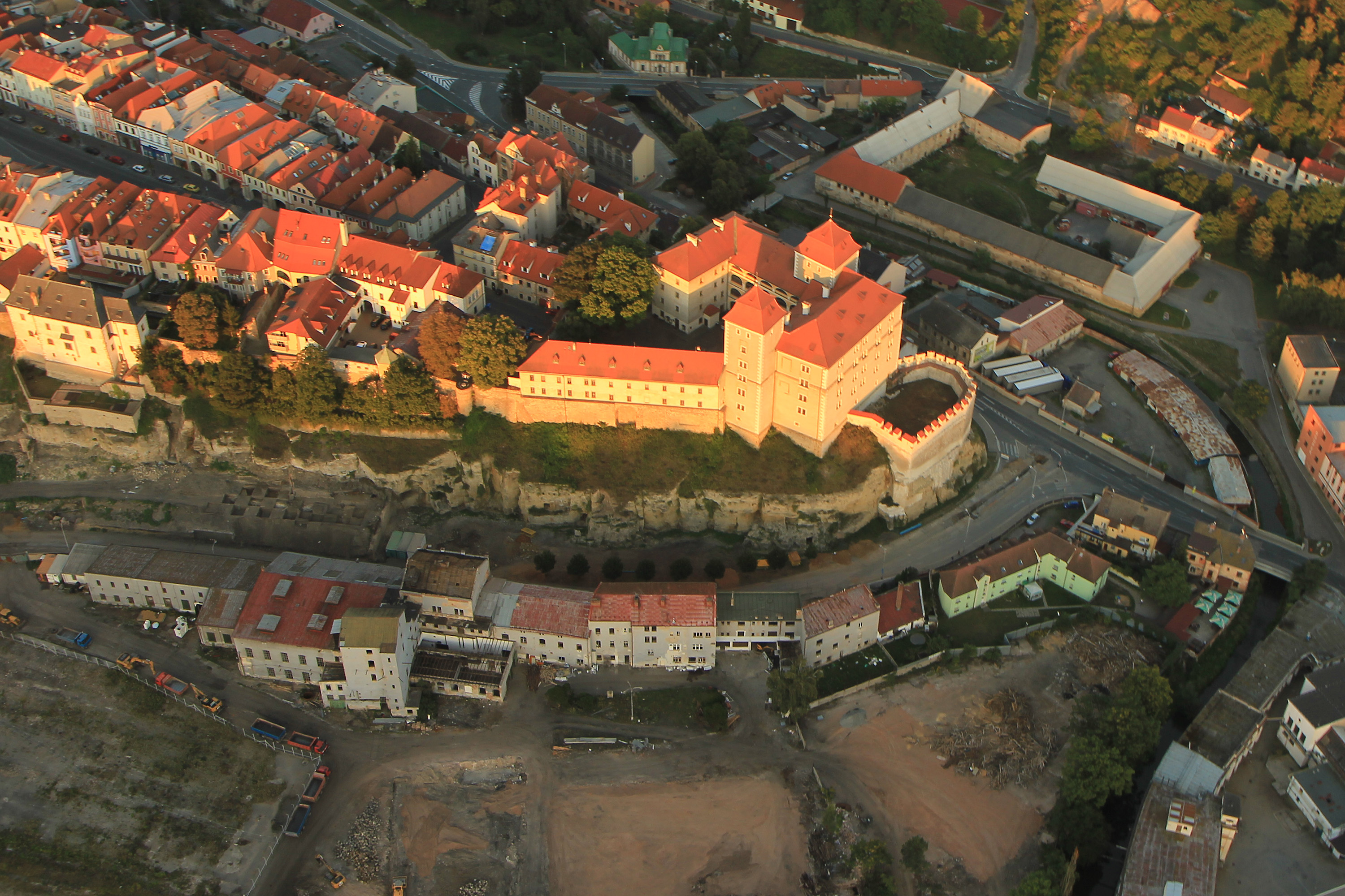 Hrad (Mladá Boleslav), Kateřiny Militké 55, Mladá Boleslav